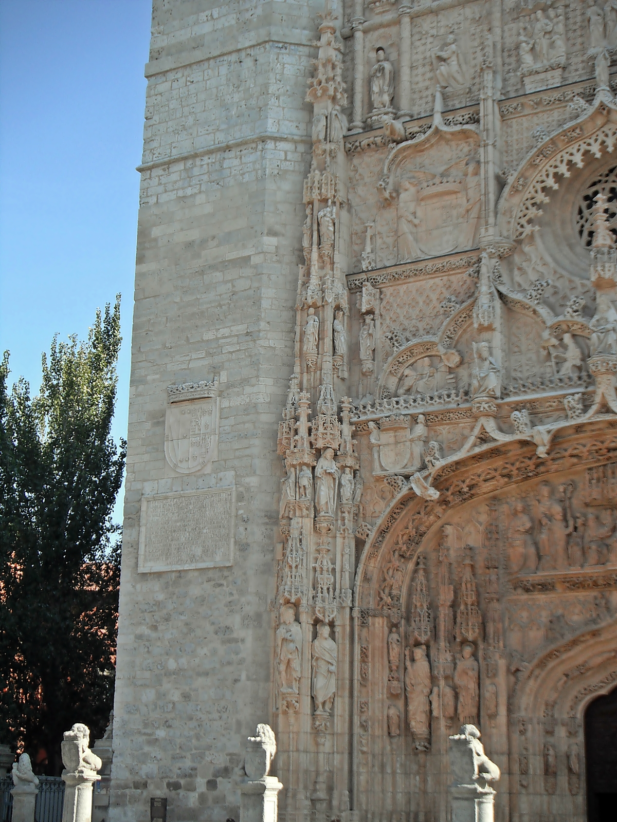 Iglesia conventual de San Pablo (Valladolid)